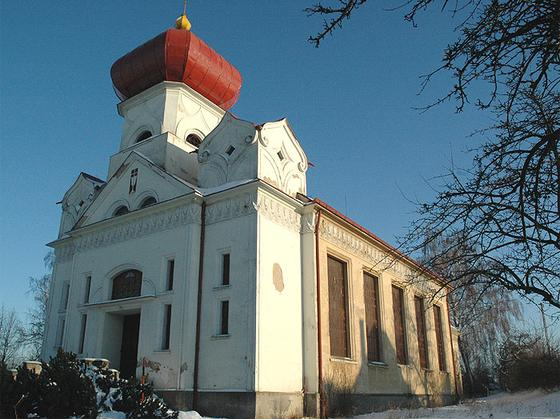 Sbor Sv. Cyrila a Metoděje Československé církve husitské - Chudobín